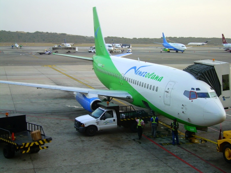 Boeing 737-200 Adv en el Aeropuerto Internacional Simón Bolívar, de Maiquetía, Venezuela. autor= Carlos Colina (yo mismo)